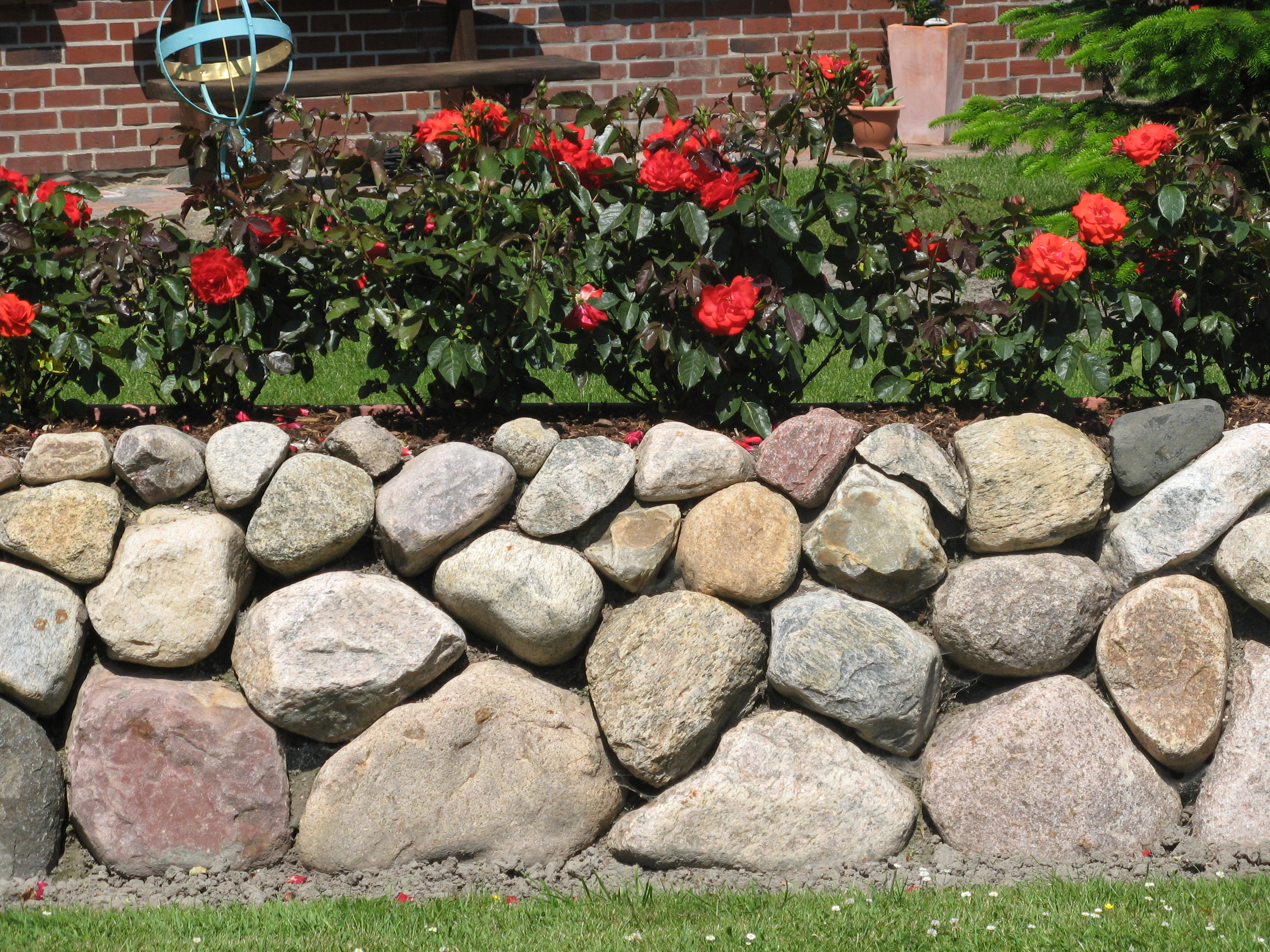 Friesenwall in Oldenswort